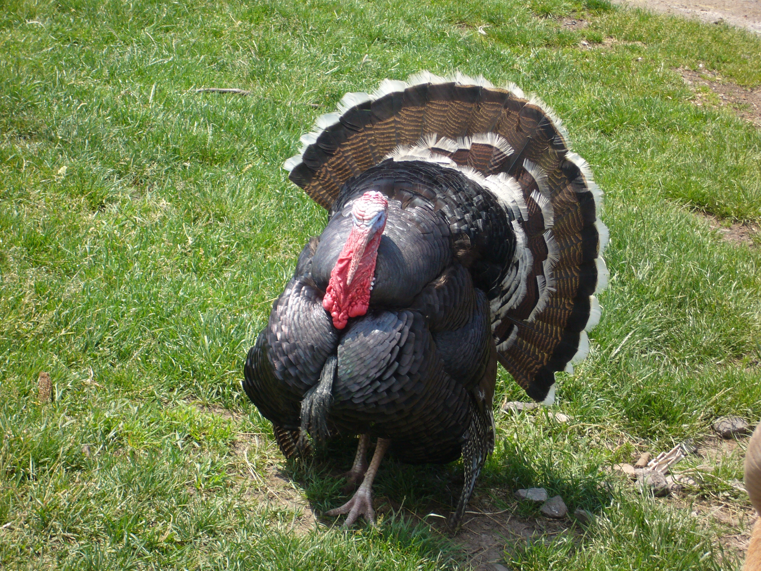 Na obrázku je krocan.